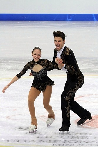 Алессандра Чернуски и Филиппо Амброзини (Италия) на чемпионате мира по фигурному катанию среди юниоров 2012